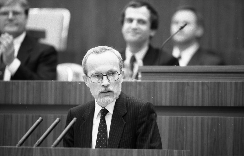 BER 24/19.4.90/Berlin: Volkskammer/ Die 3. Sitzung der Volkskammer begann mit der Regierungserklärung von Ministerpräsident Lother de Maizière. Die Aussprache der acht Fraktionen darüber wird die Sitzung am 20.4. bestimmen. ADN/Oberst